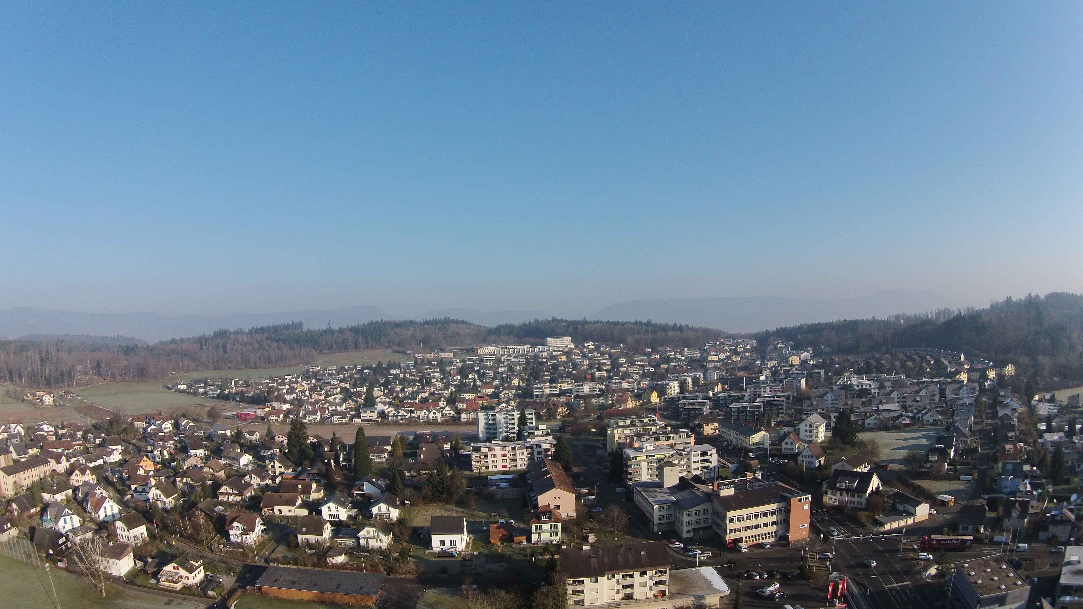 Unterentfelden